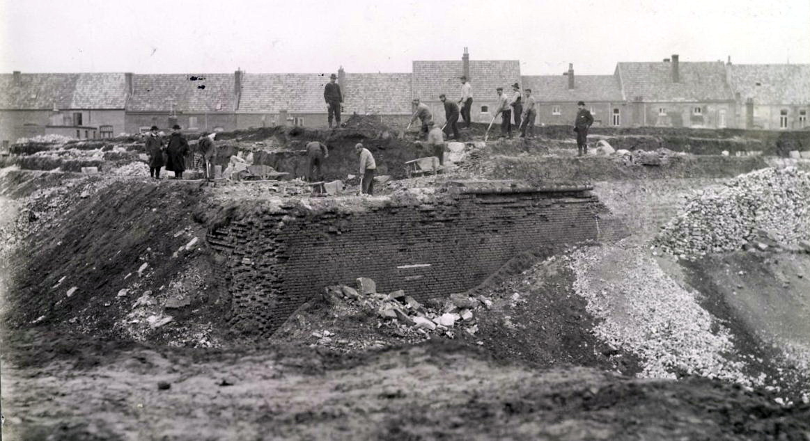 Sloop van de walmuur tussen Hertogsingel en Jekerstraat; op de voorgrond mogelijk bastion Brandenburg (opmerking: neg nr 156-264)